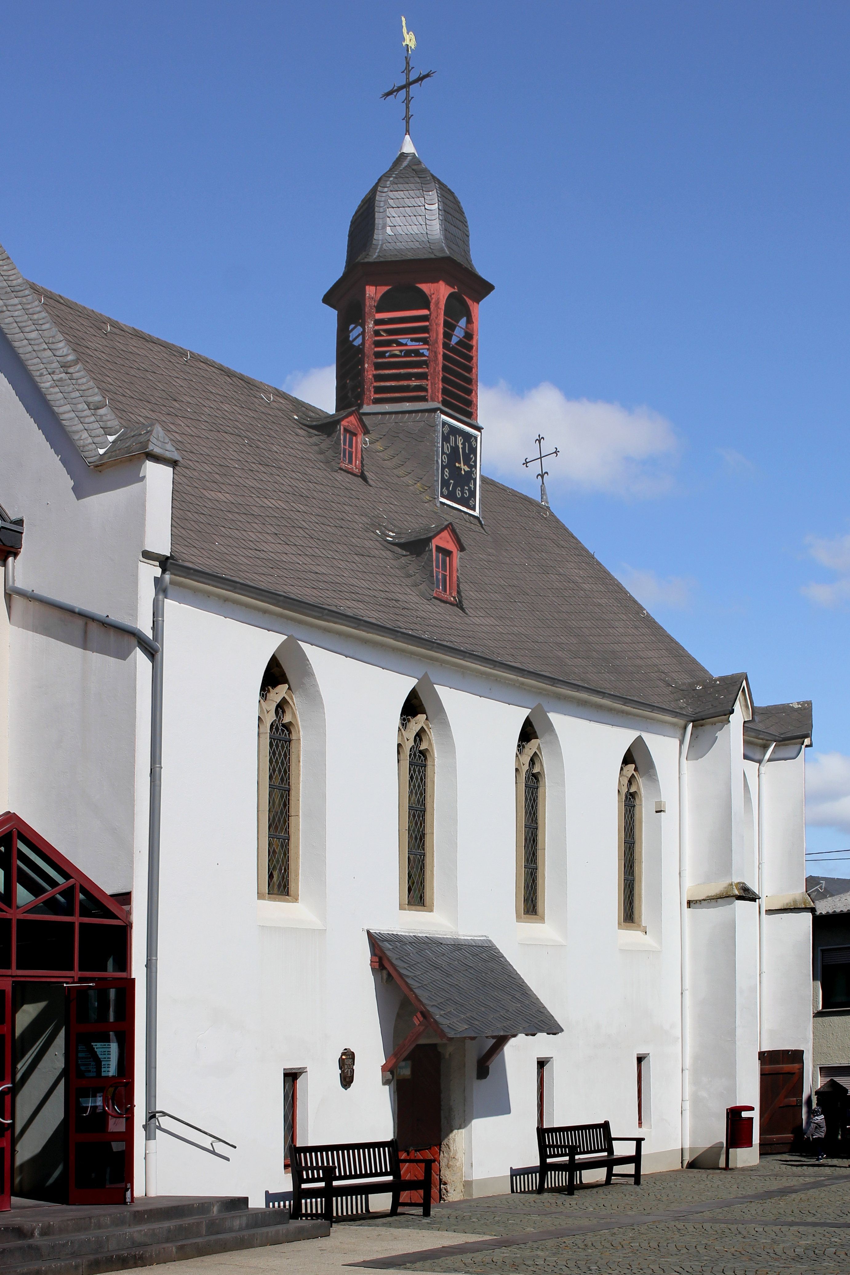 Alte Kapelle, erbaut wahrscheinlich 1313, ältestes erhaltenes Bauwerk in Mülheim-Kärlich